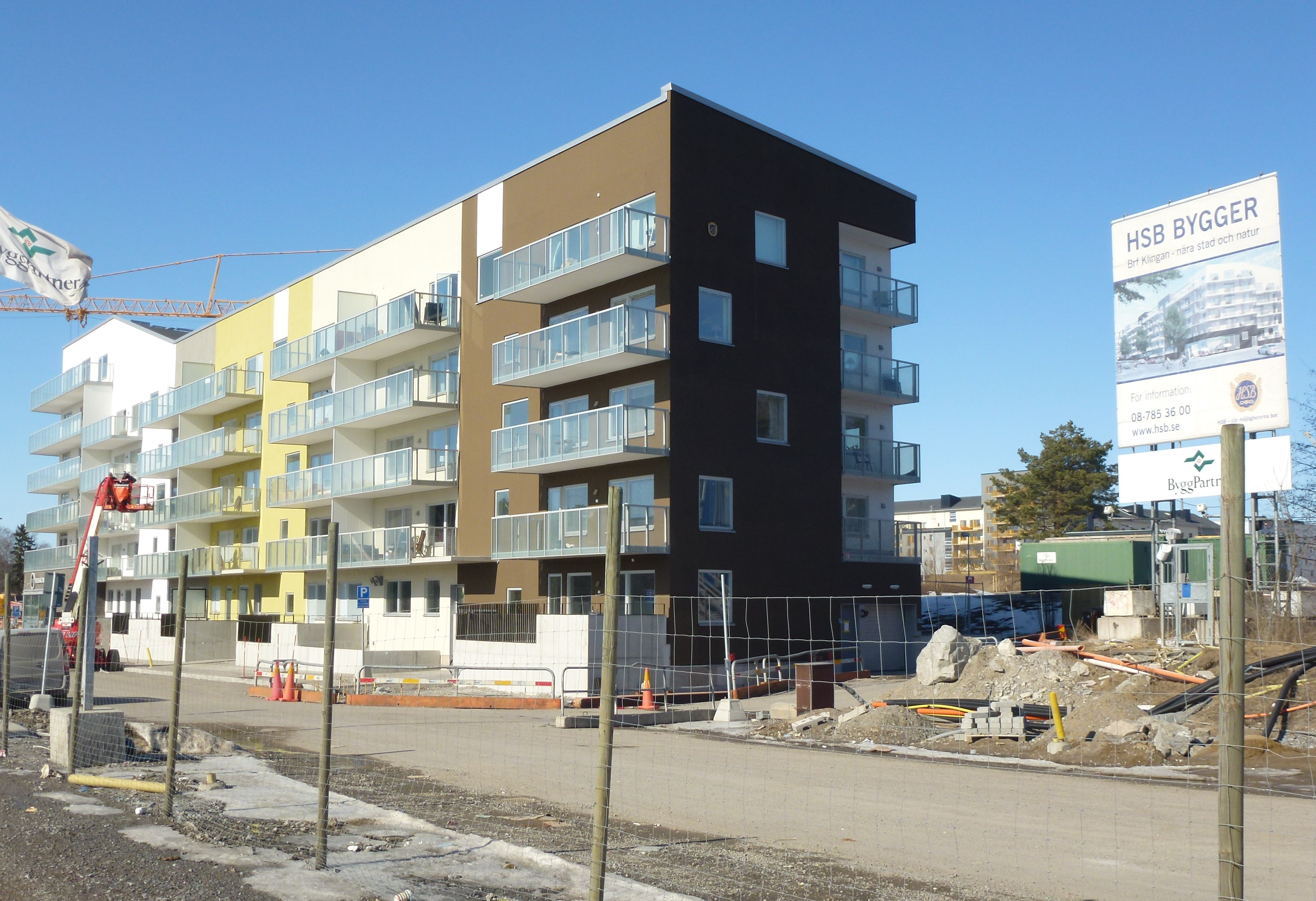 Nybyggnader i västra Ursvik